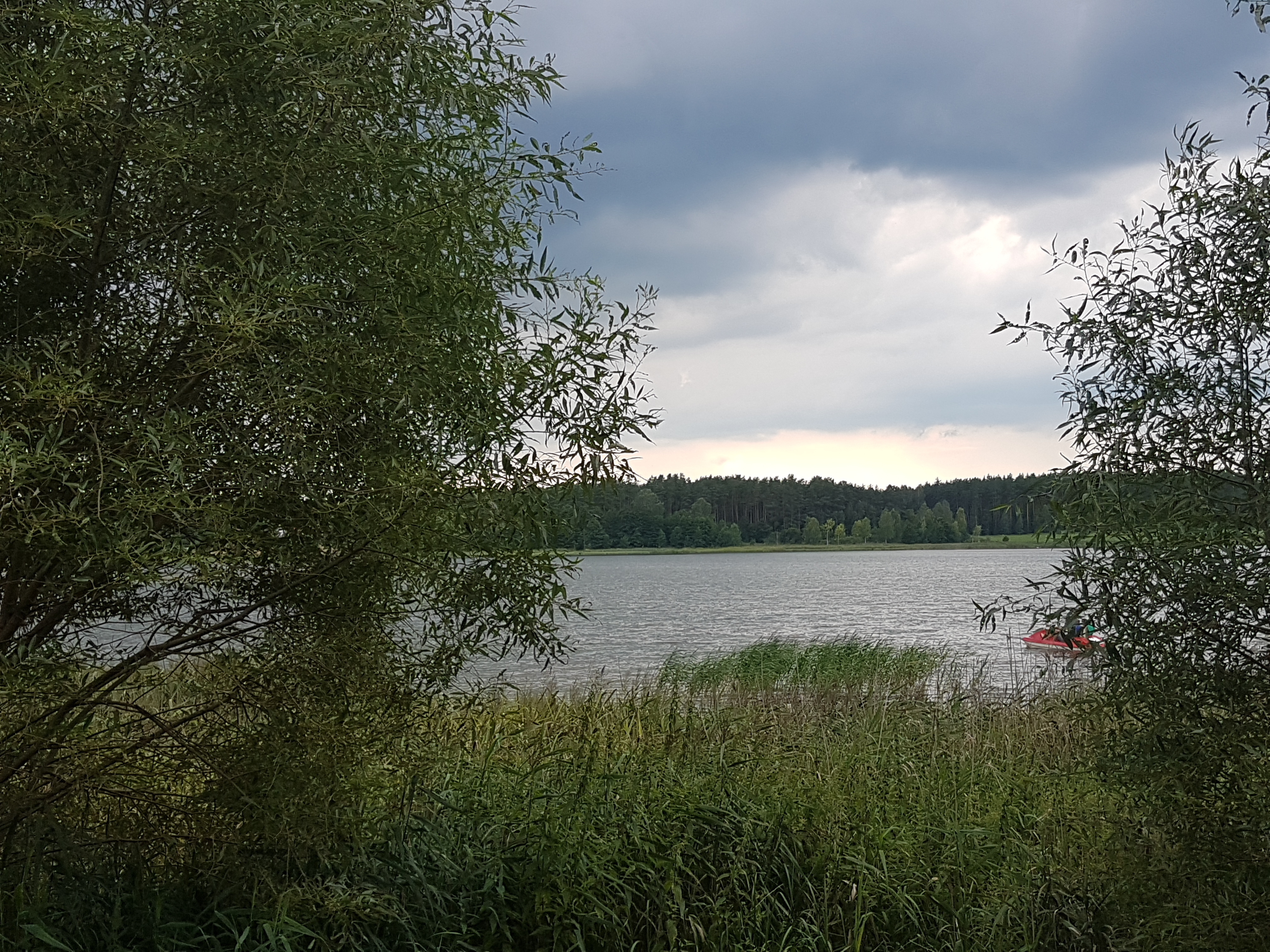 Jezioro Spychowskie w Spychowie